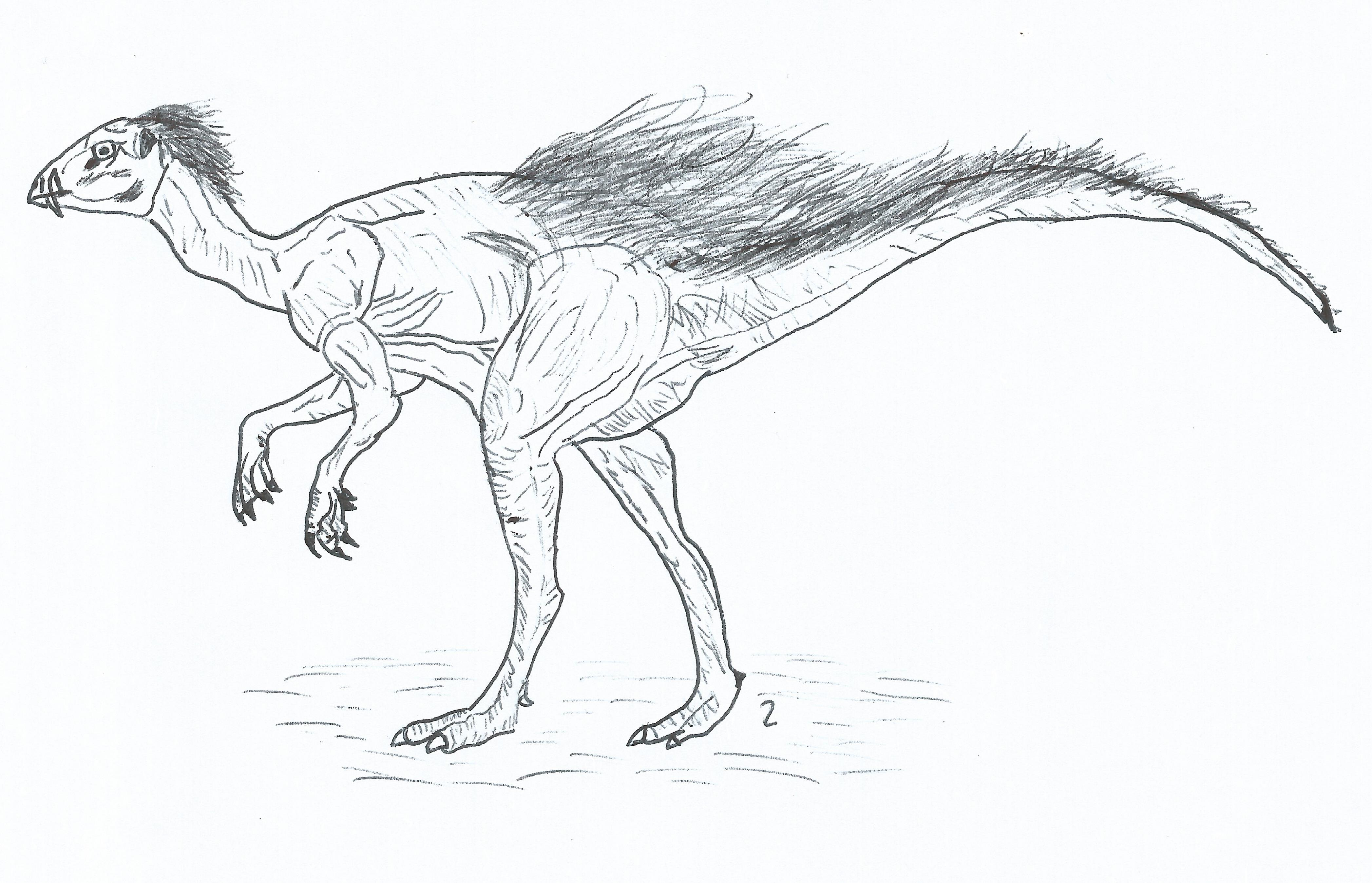 Restauración de Ornitópodo Komlosaurus carbonis